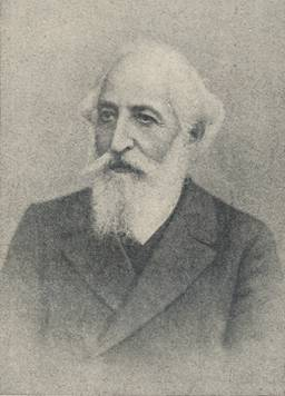 Isaak Rülf (1831–1902), seit 1865 Rabbiner in Memel (Ostpreußen)